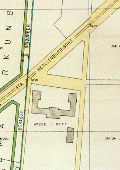 Kartenausschnitt mit Mosse-Stift